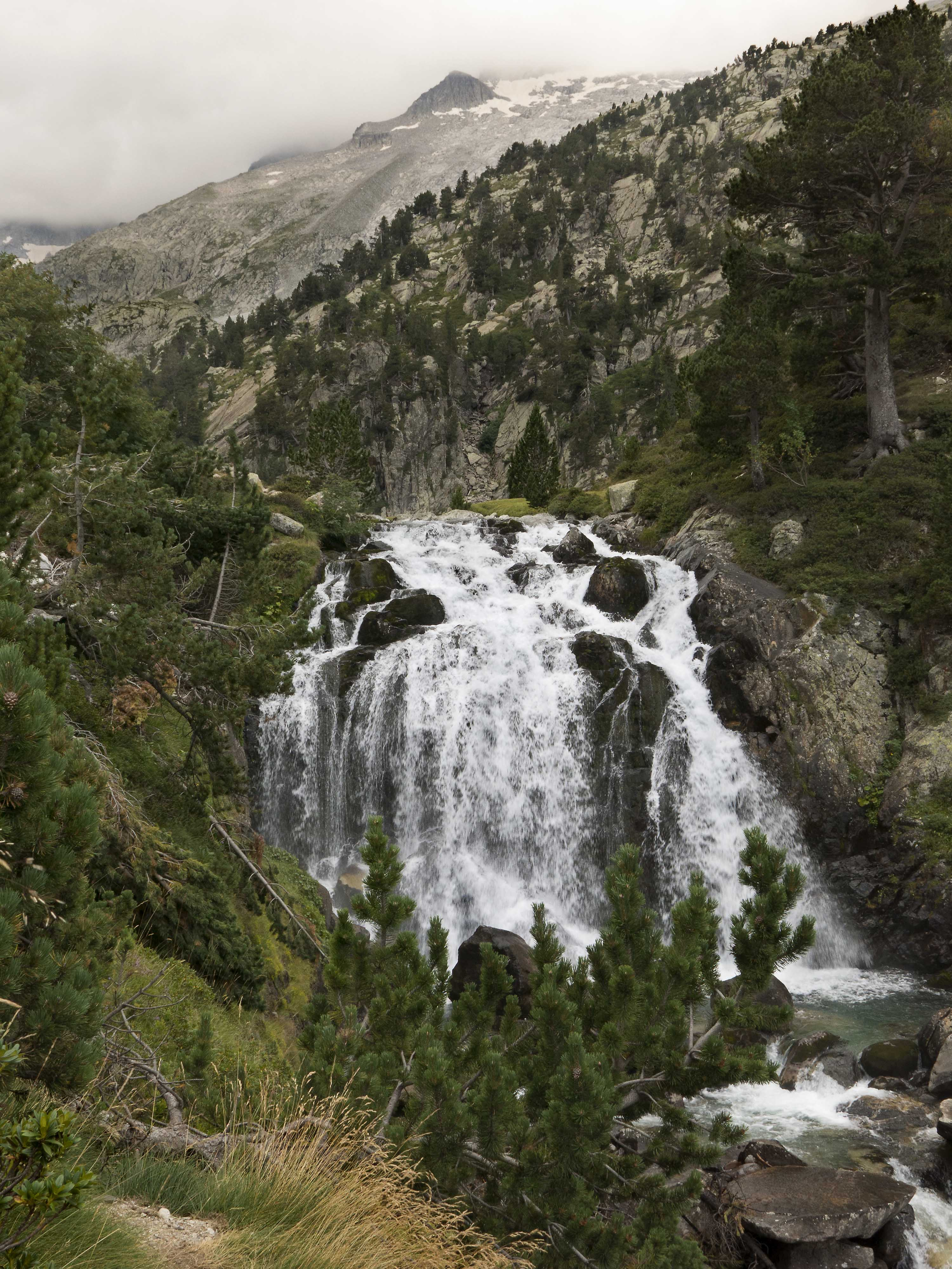 És un fenomen càrstic que es produeix al curs alt del riu Éssera, a uns 2.074 m d'altitud, on aquest riu desapareix sota terra.